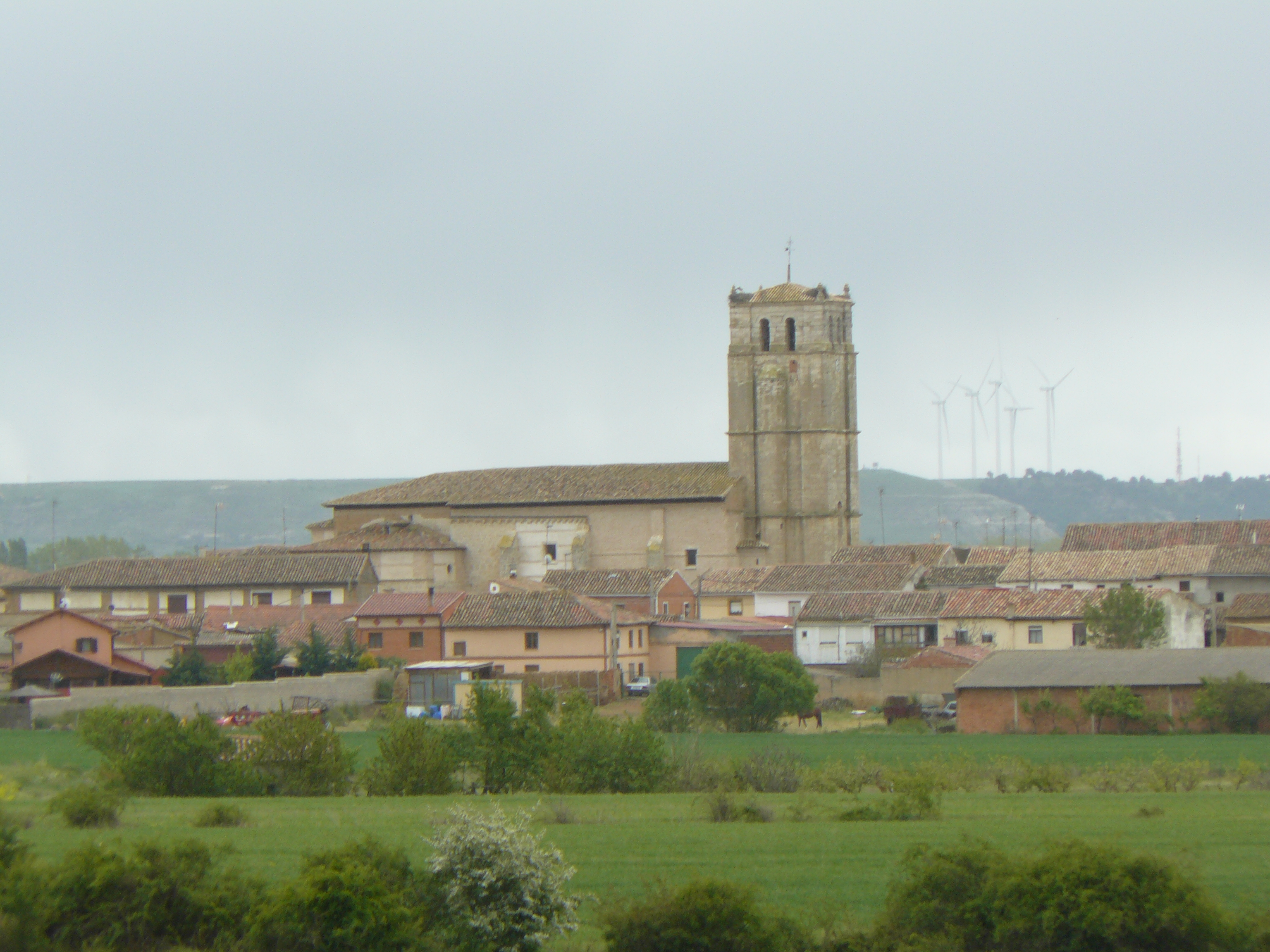 Villaumbrales, Palencia.